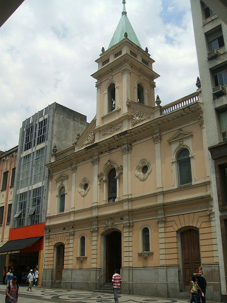 Igreja de Santo Antônio, na Praça do Patriarca, em São Paulo, Brasil